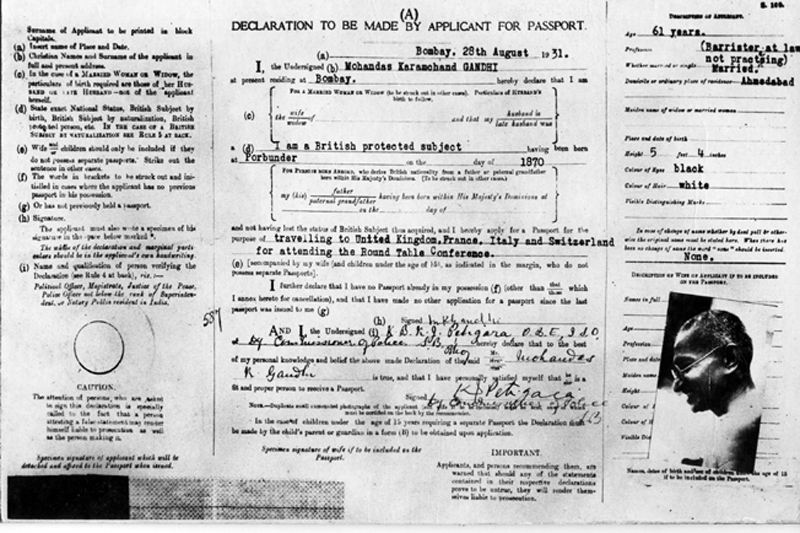 Gandhi's passeport, 1931.